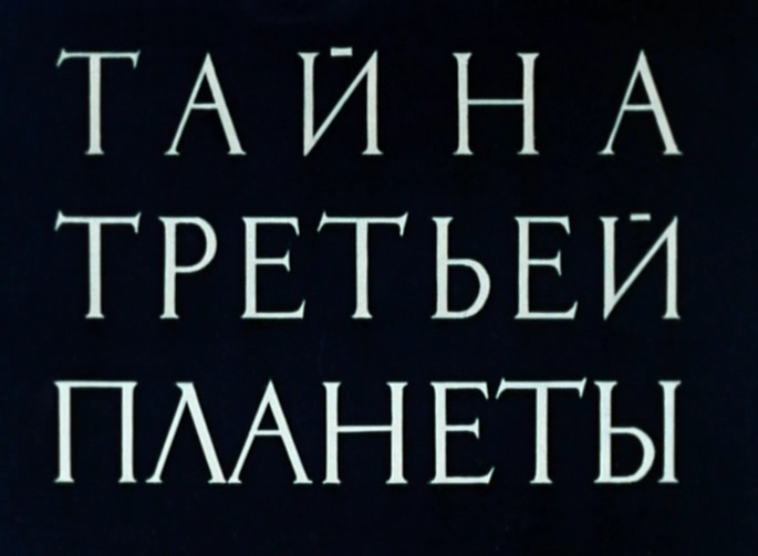 Заставка советского полнометражного научно-фантастического мультфильма «Тайна третьей планеты».